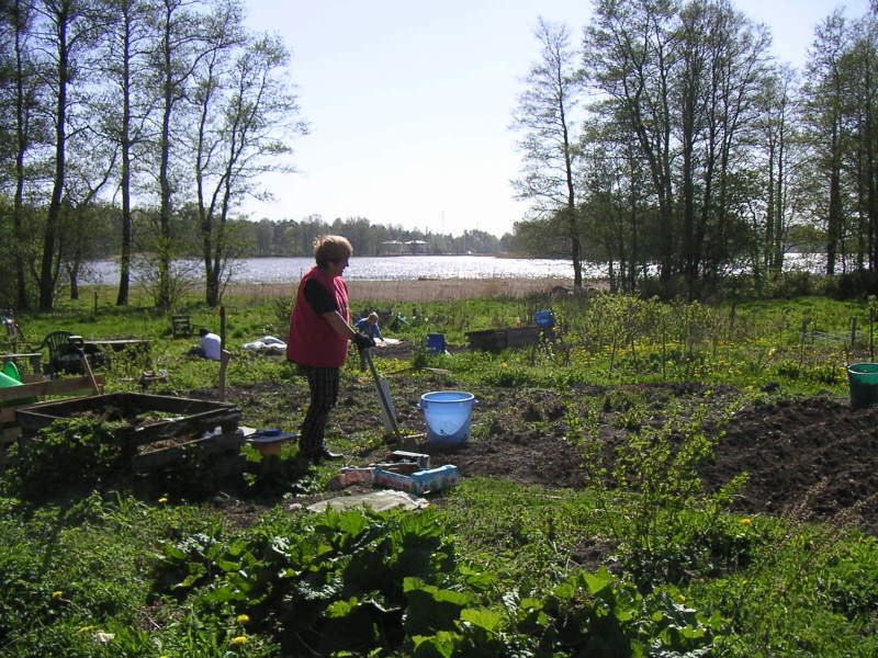 A garden lot in Kivinokka